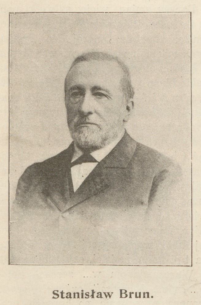 Stanisław Brun